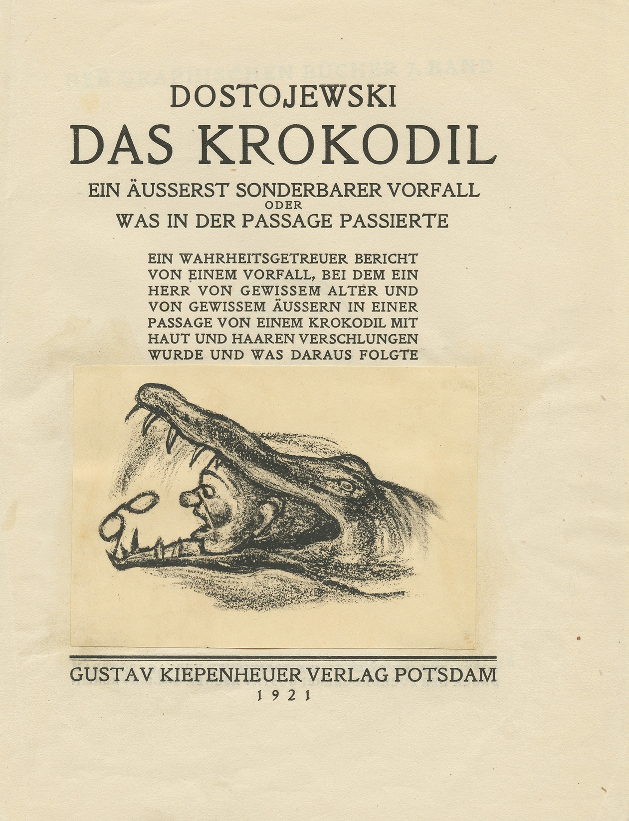 Fjodor Dostojewski: Das Krokodil, illustriert von Rachel Szalit-Marcus, 1921 Titelblatt